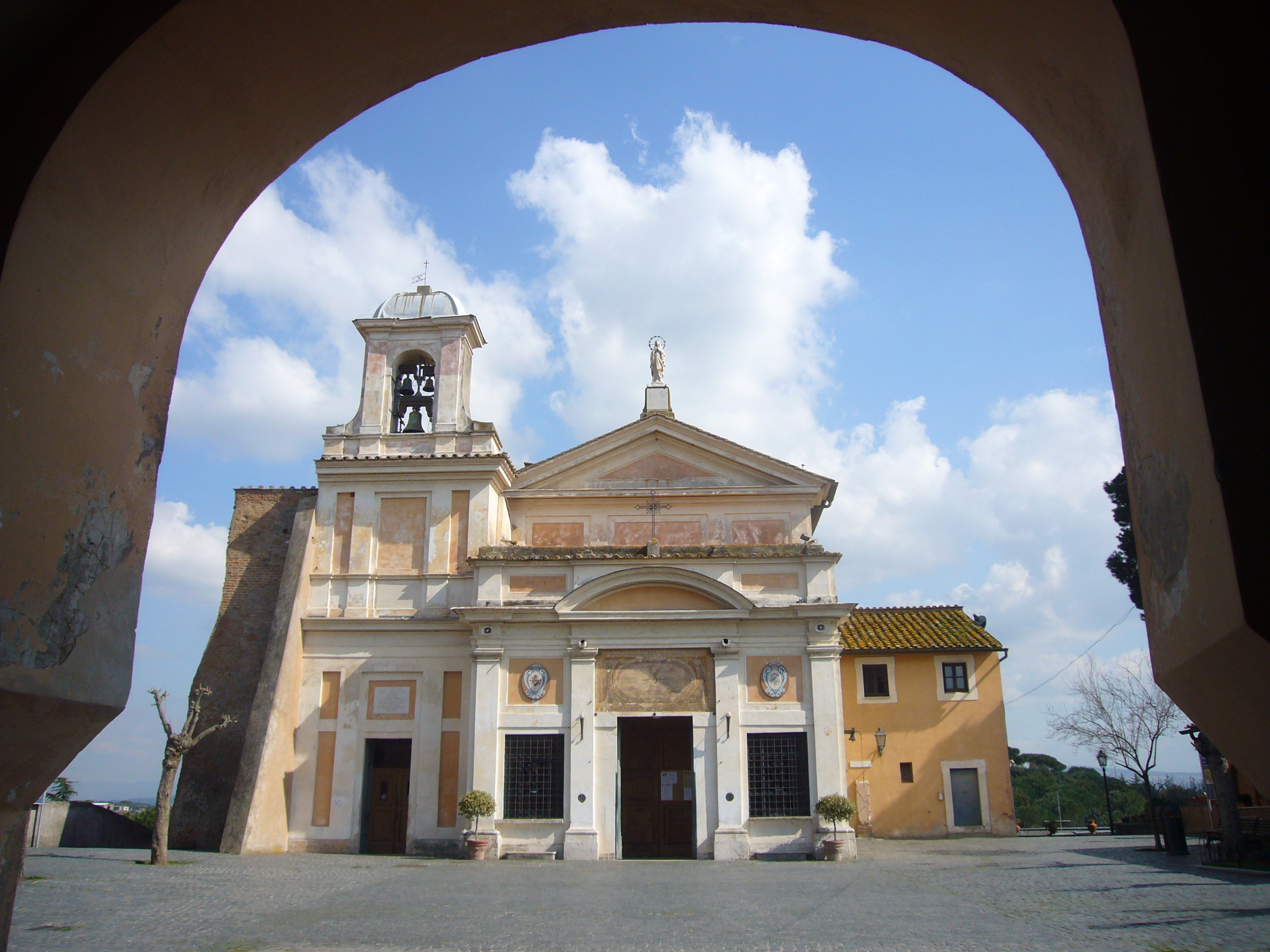 Roma, santuario del Divino Amore, la chiesa antica.